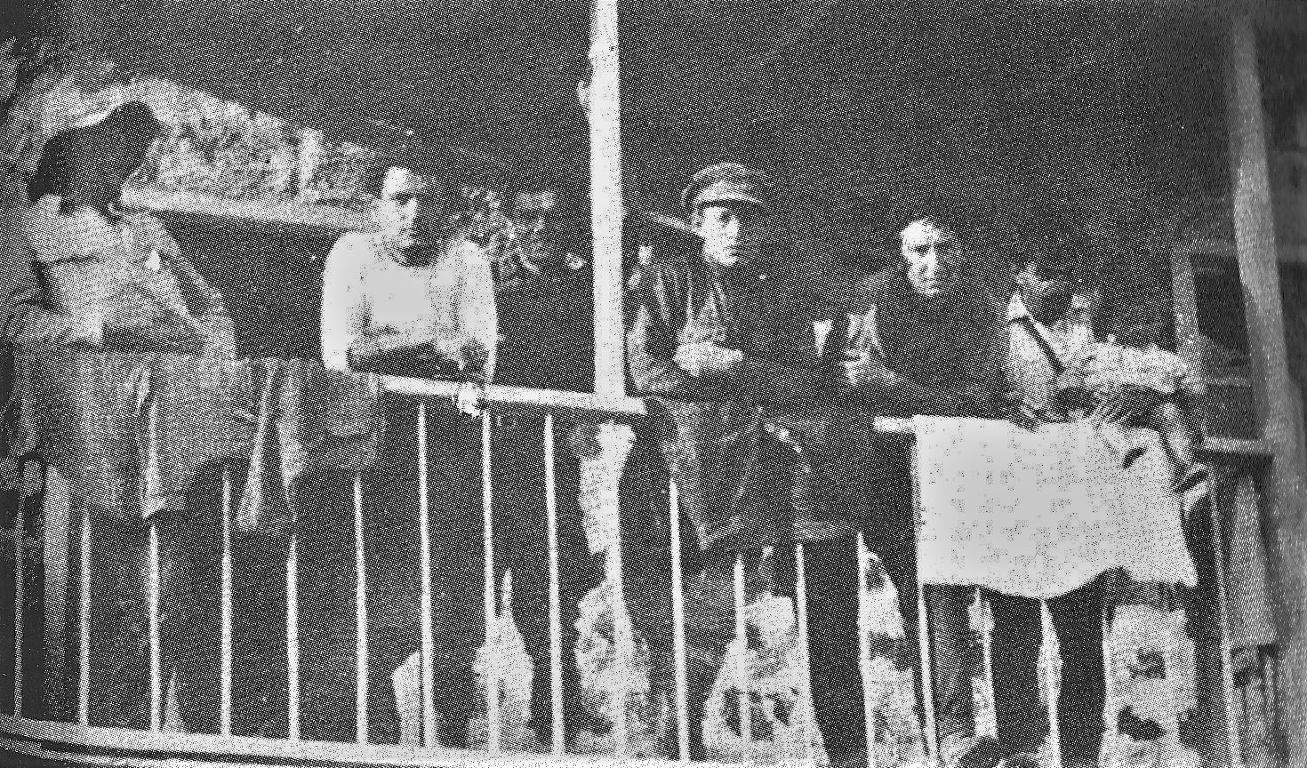 זלמן בלחובסקי (שלישי מימין) על המרפסת בתל-חי בתחילת 1920